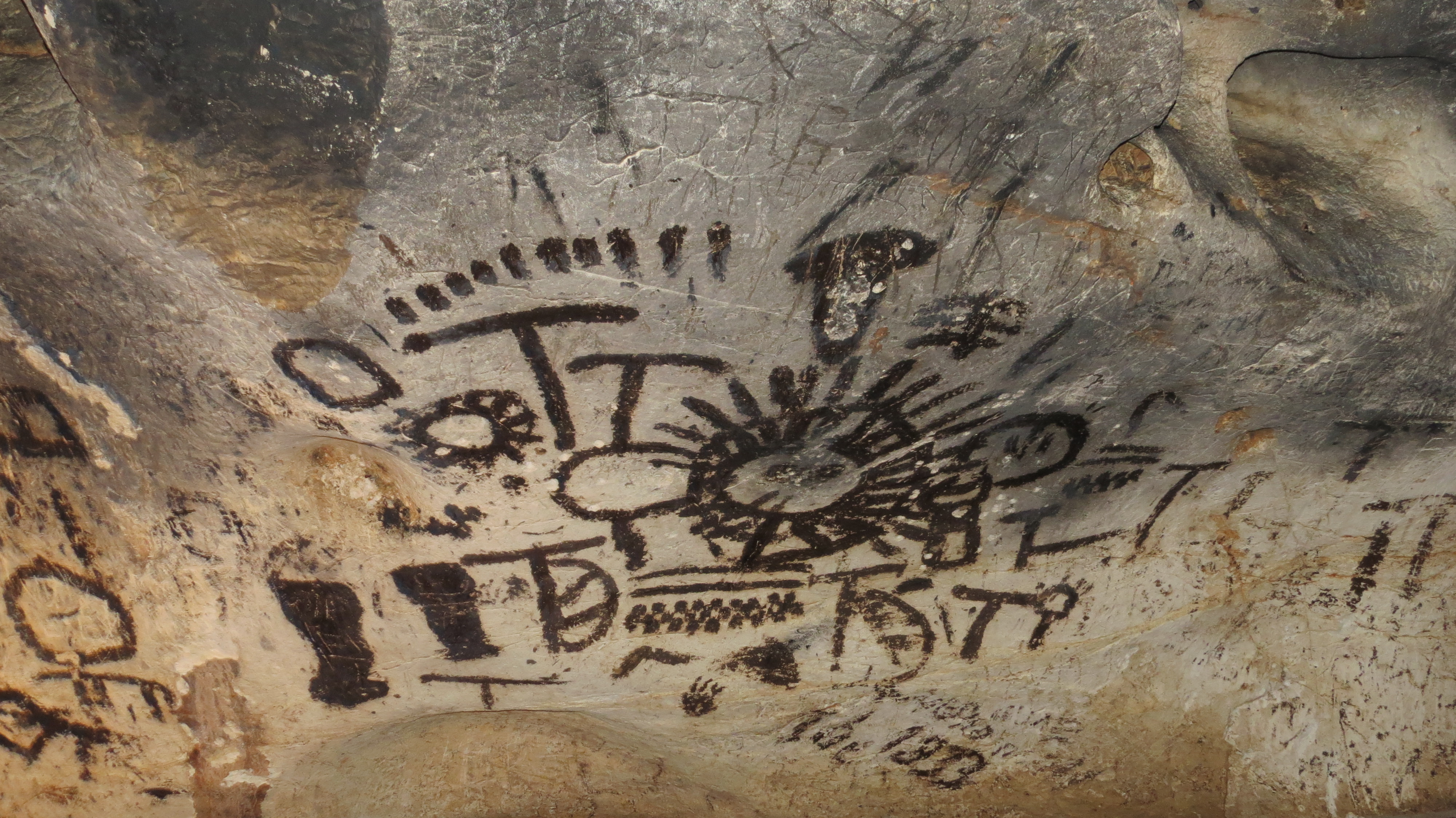 Opšis: Slika v kraški jami Magura, Bolgarija, ki naj bi prikazovala sončni koledar. S črnimi in belimi kvadratki so se šteli dnevi, pokončne črtise pa naj bi pomenile deset lunarnih mesecev.